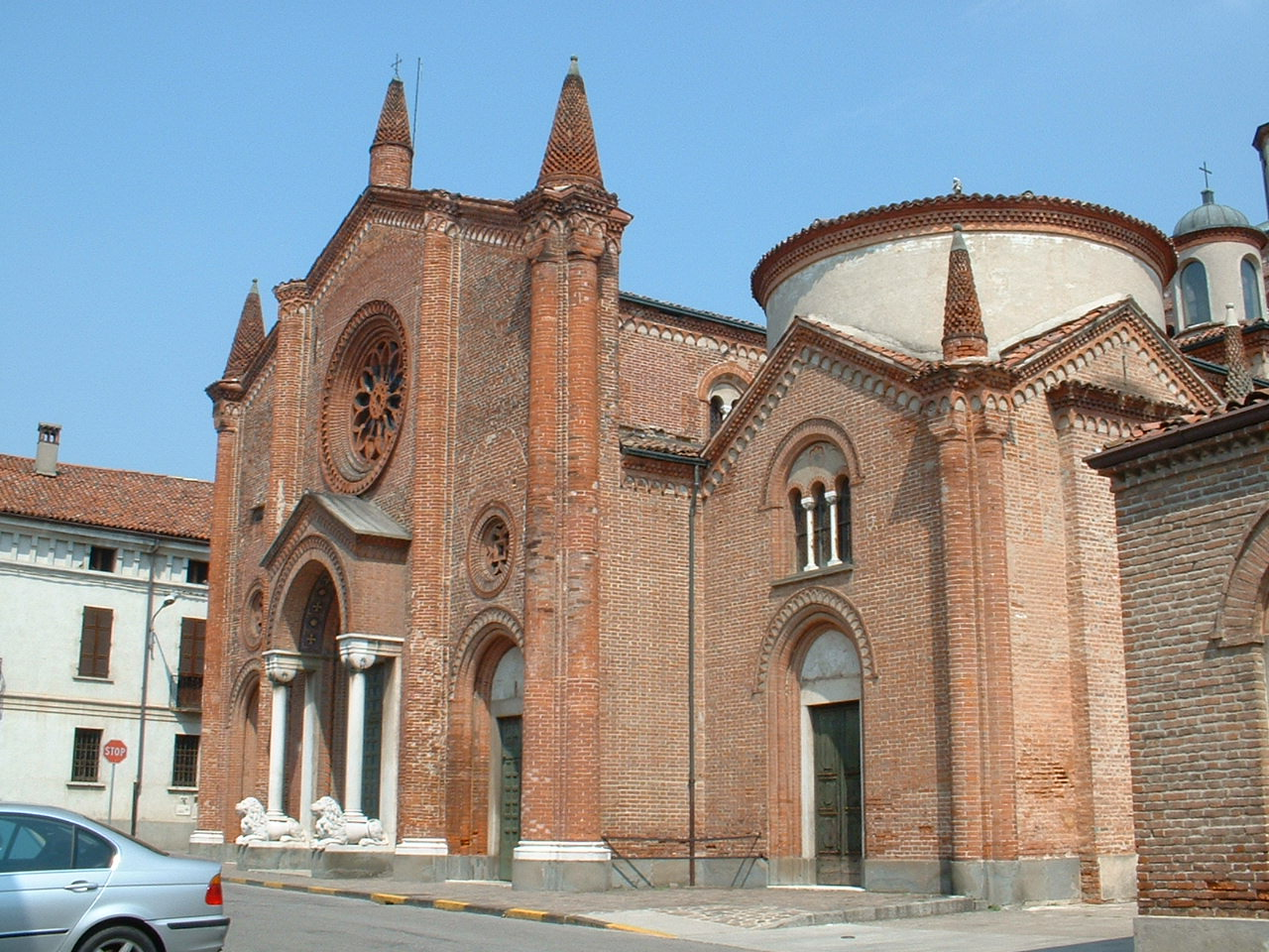 Pieve di S.Maria Assunta - Soncino